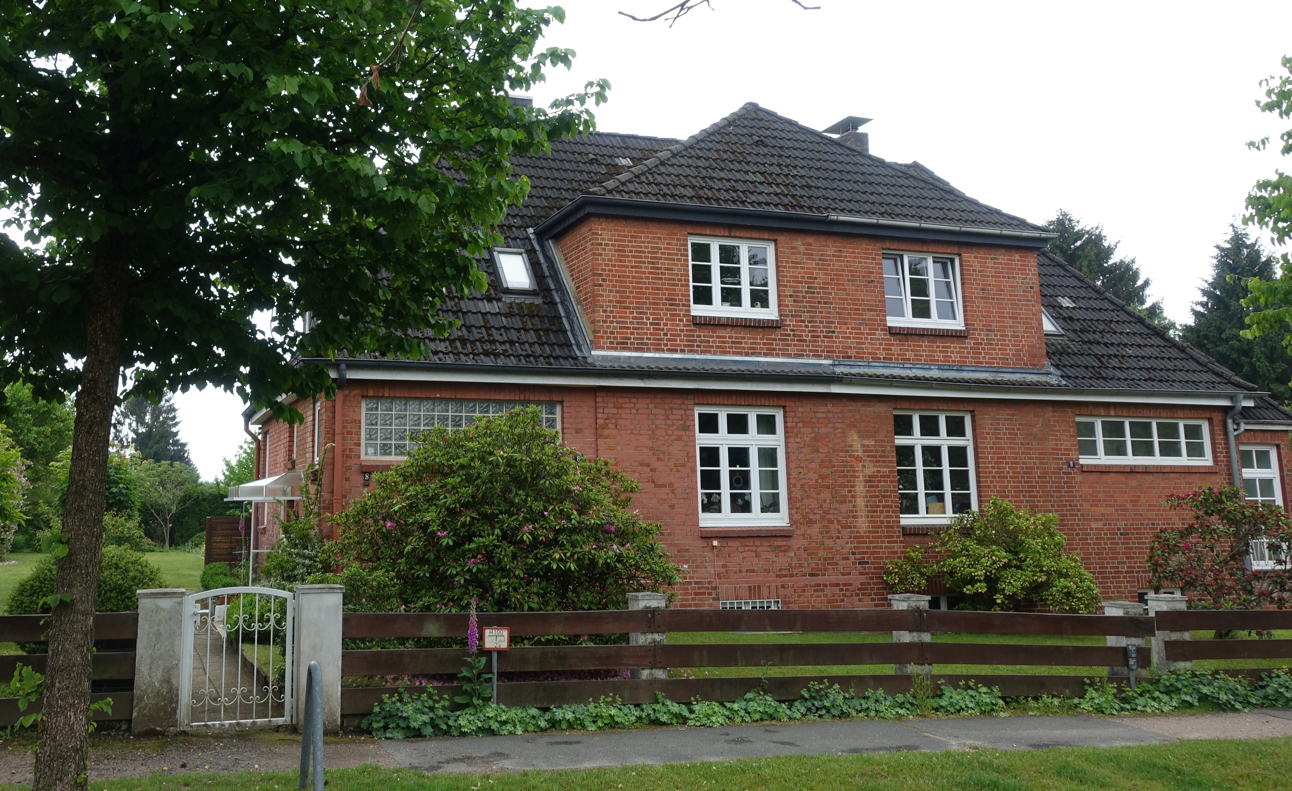 Haus Wattkorn 8 in Hamburg-Langenhorn